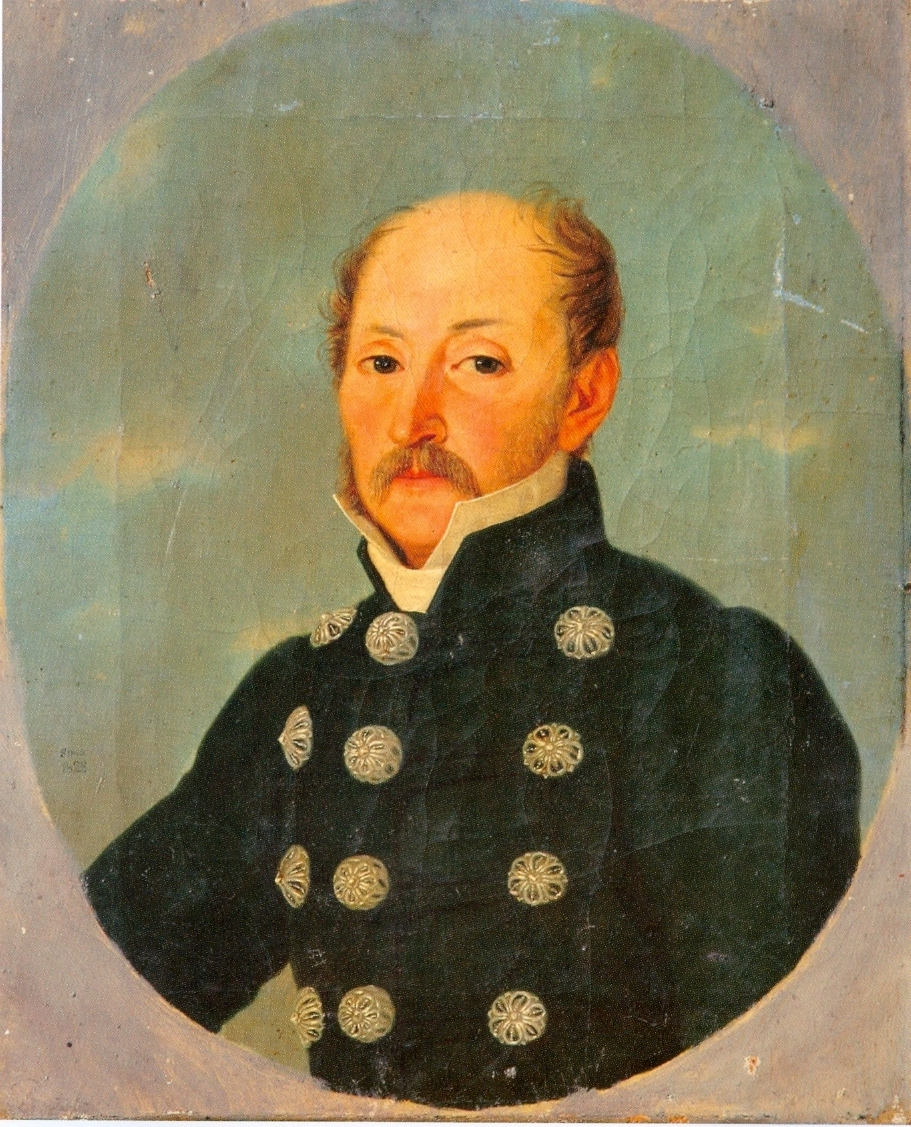 Kisfaludy Sándor portréja, olajfesmény